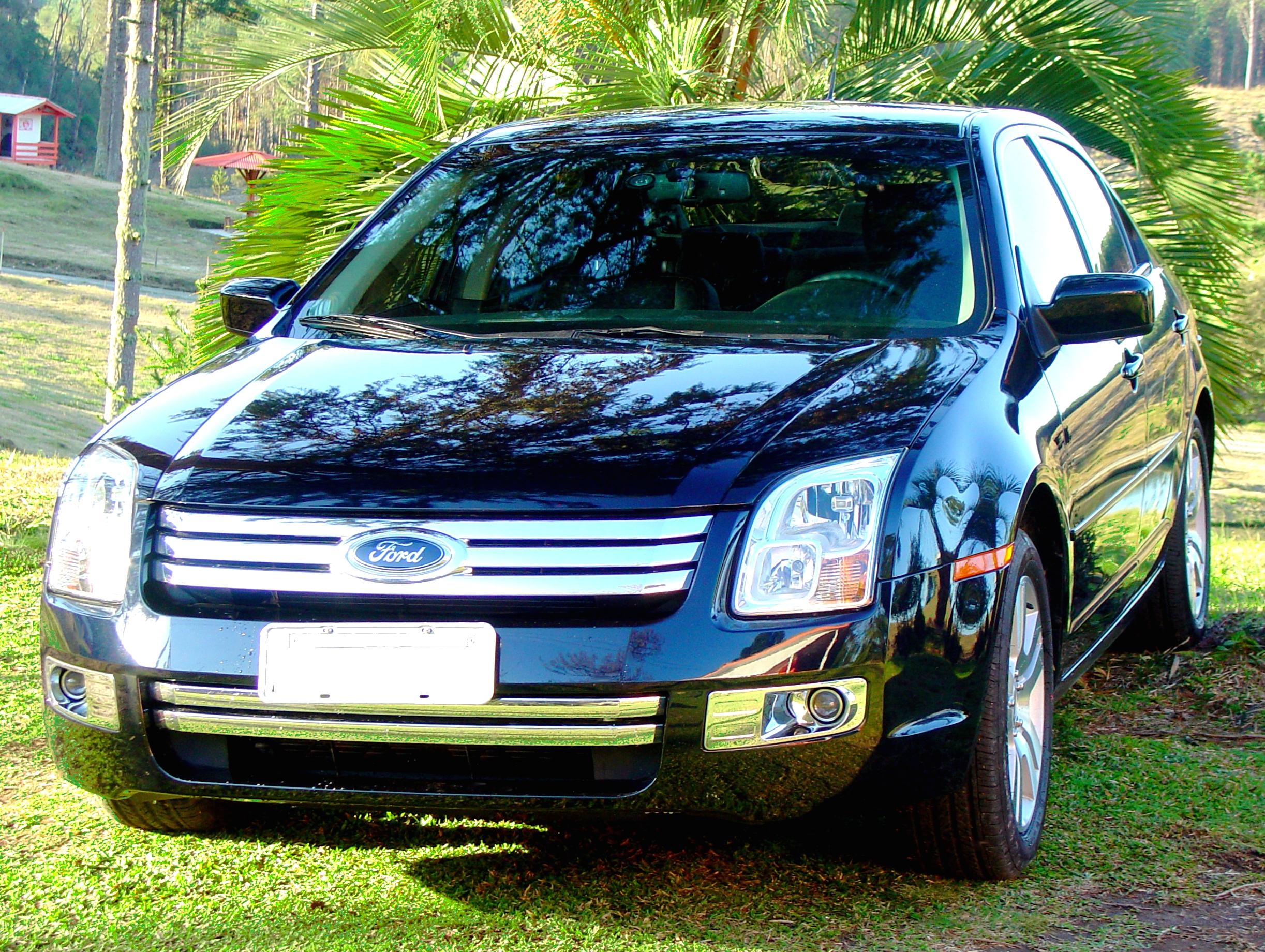 FOTO DE AUTOMÓVEL FORD FUSION